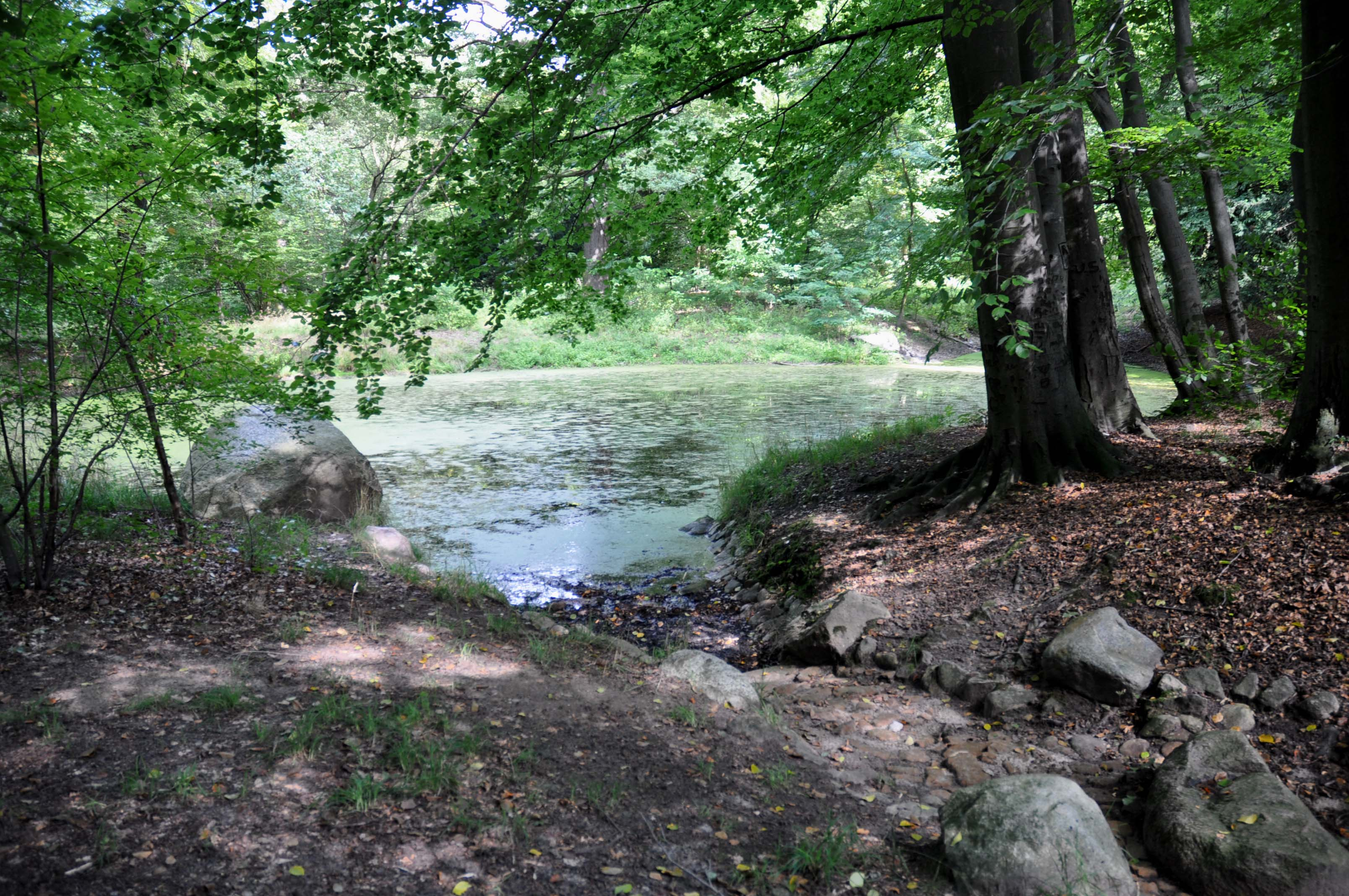 Der Felsenteich oberhalb der Teufelsschlucht im Park Klein-Glienicke